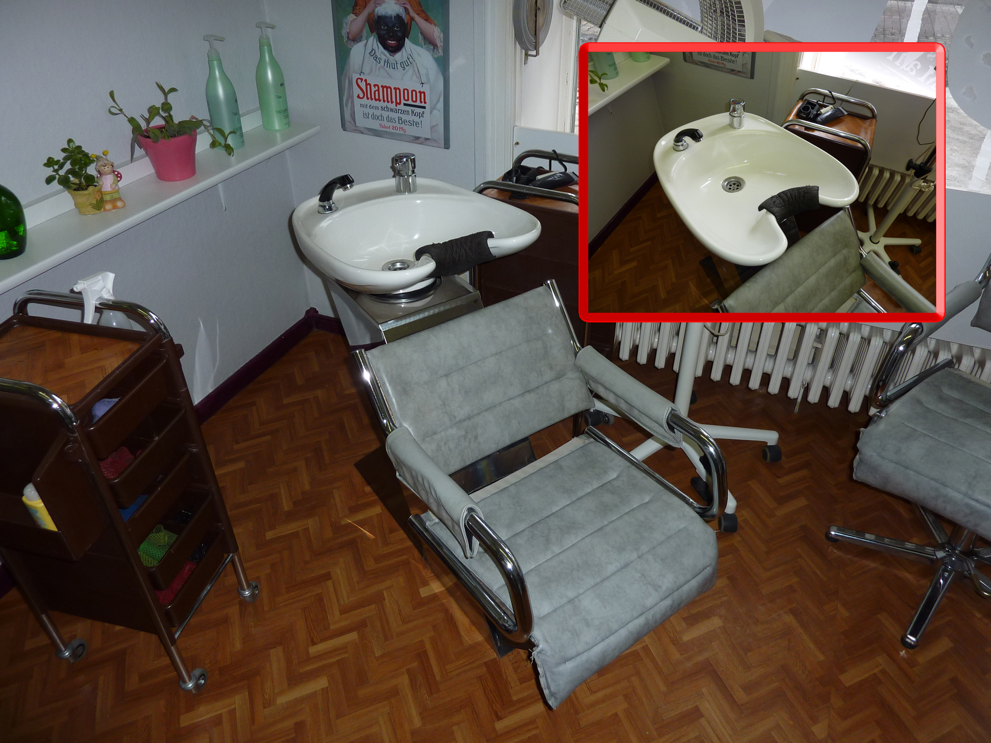 Haar-Waschbecken in einem Frisier-Salon